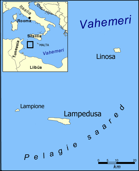 Pelagie saarte kaart